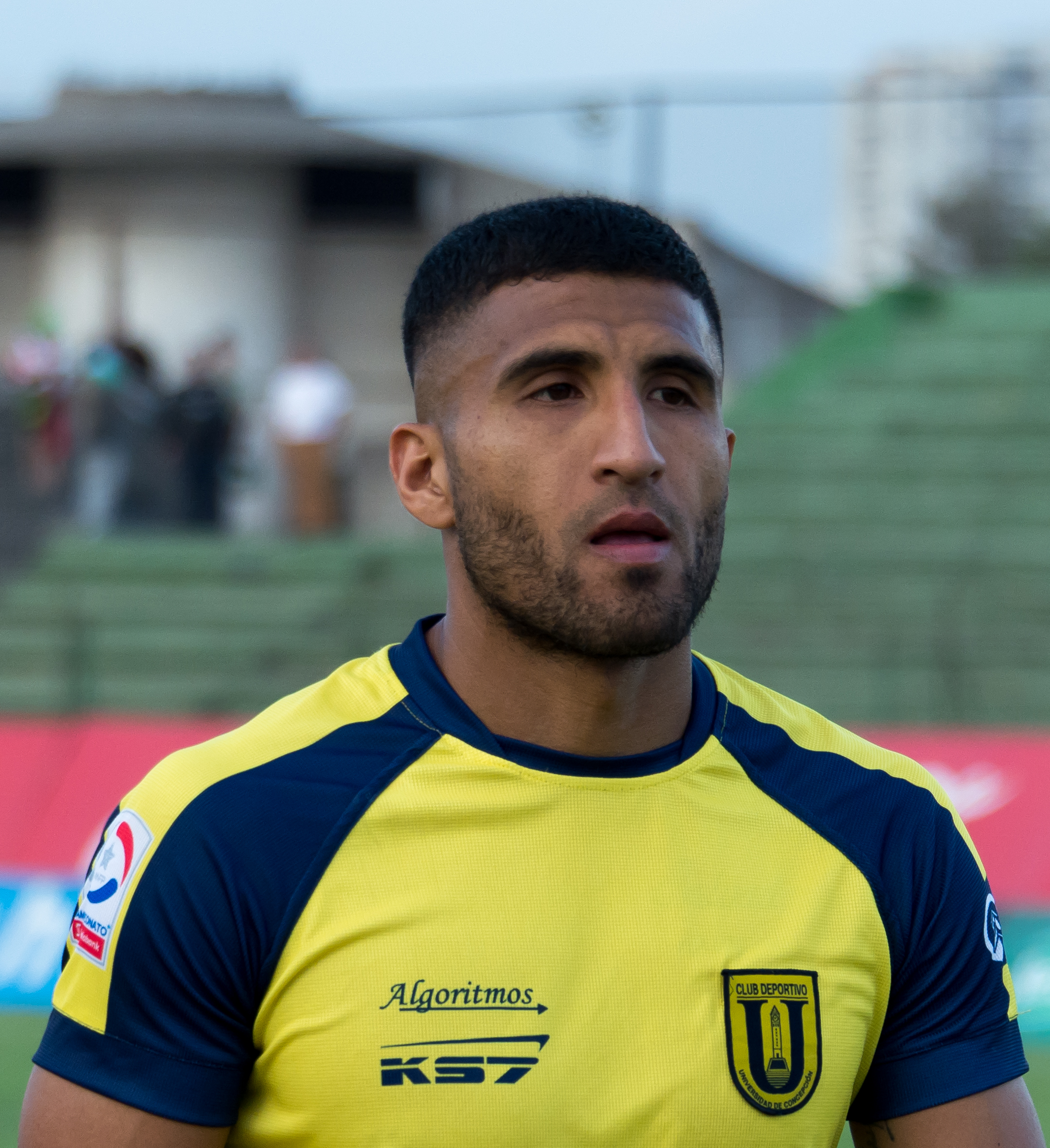 Josepmir Ballón, Palestino v Universidad de Concepción, Estadio Municipal de La Cisterna, La Cisterna, Santiago, Región Metropolitana, Chile.